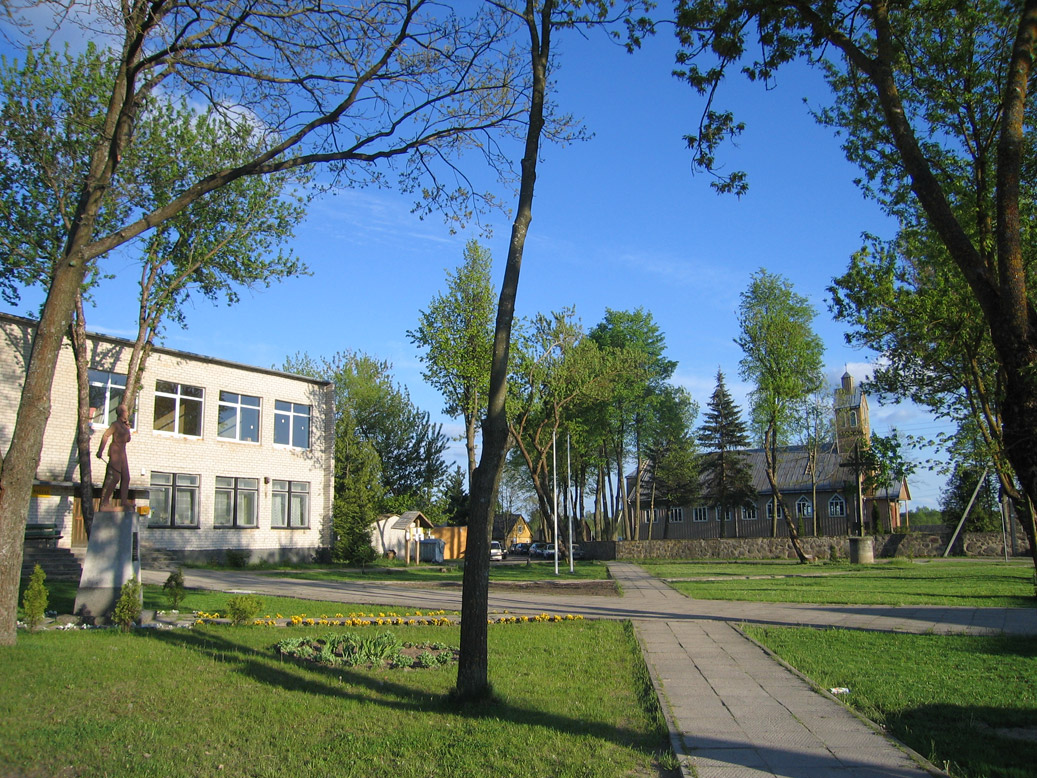 Kapčiamiestis. Central square.